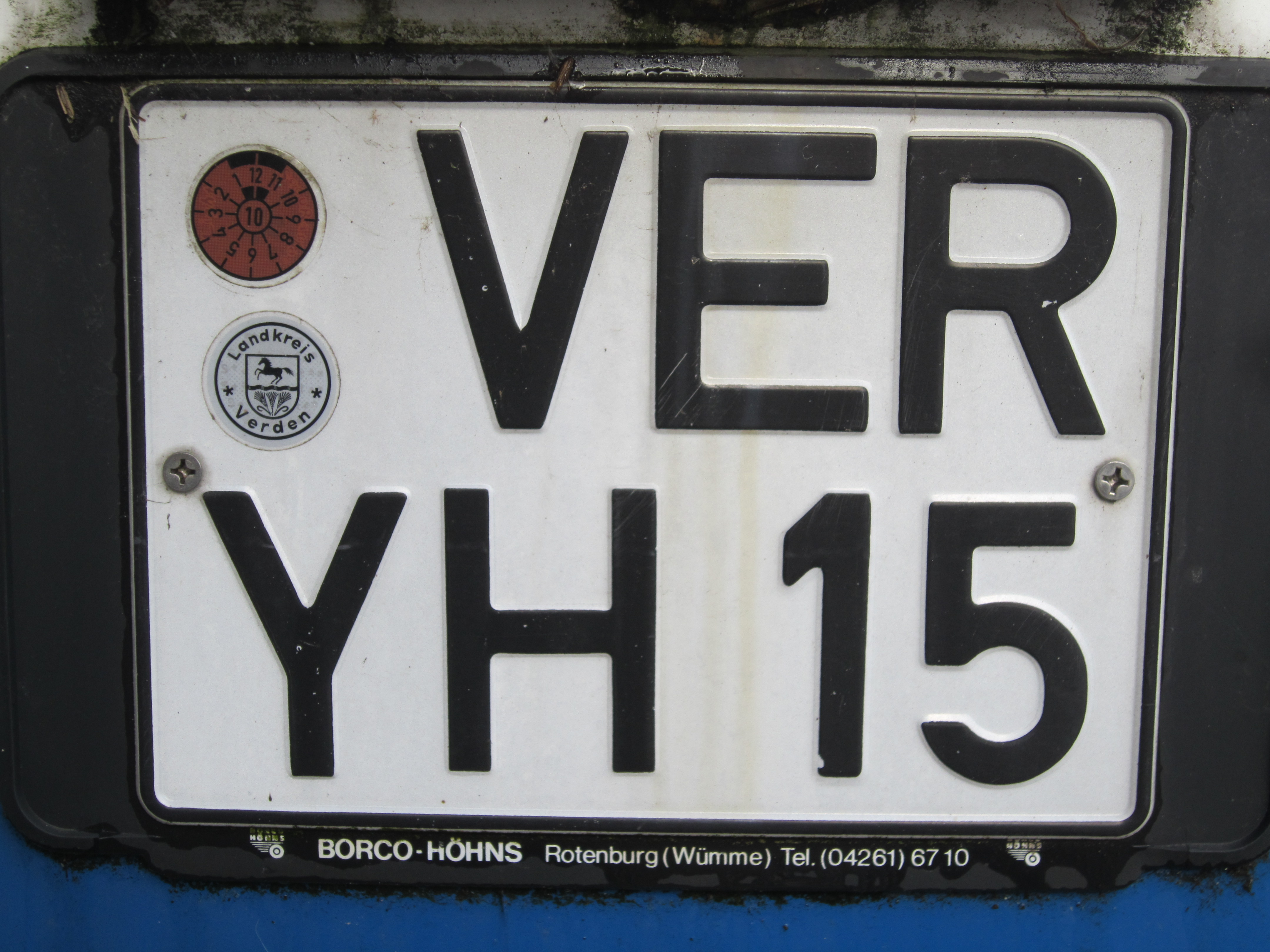 licenseplate Germany Lower Saxony Verden